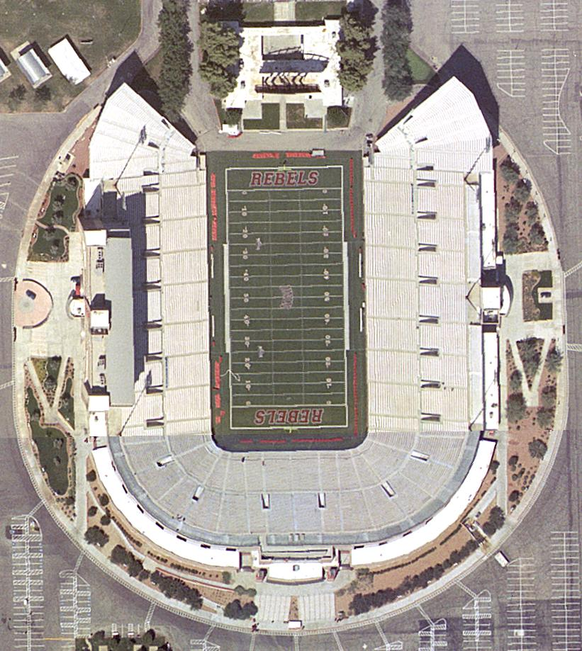 Sam Boyd Stadium in Las Vegas, Nevada satellite view taken September 2005.